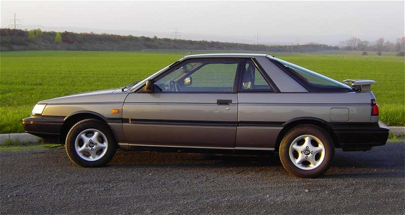 1987er Nissan Sunny B12 mit E16i-Maschine (1,6l, 4 Zylinder, 73PS)